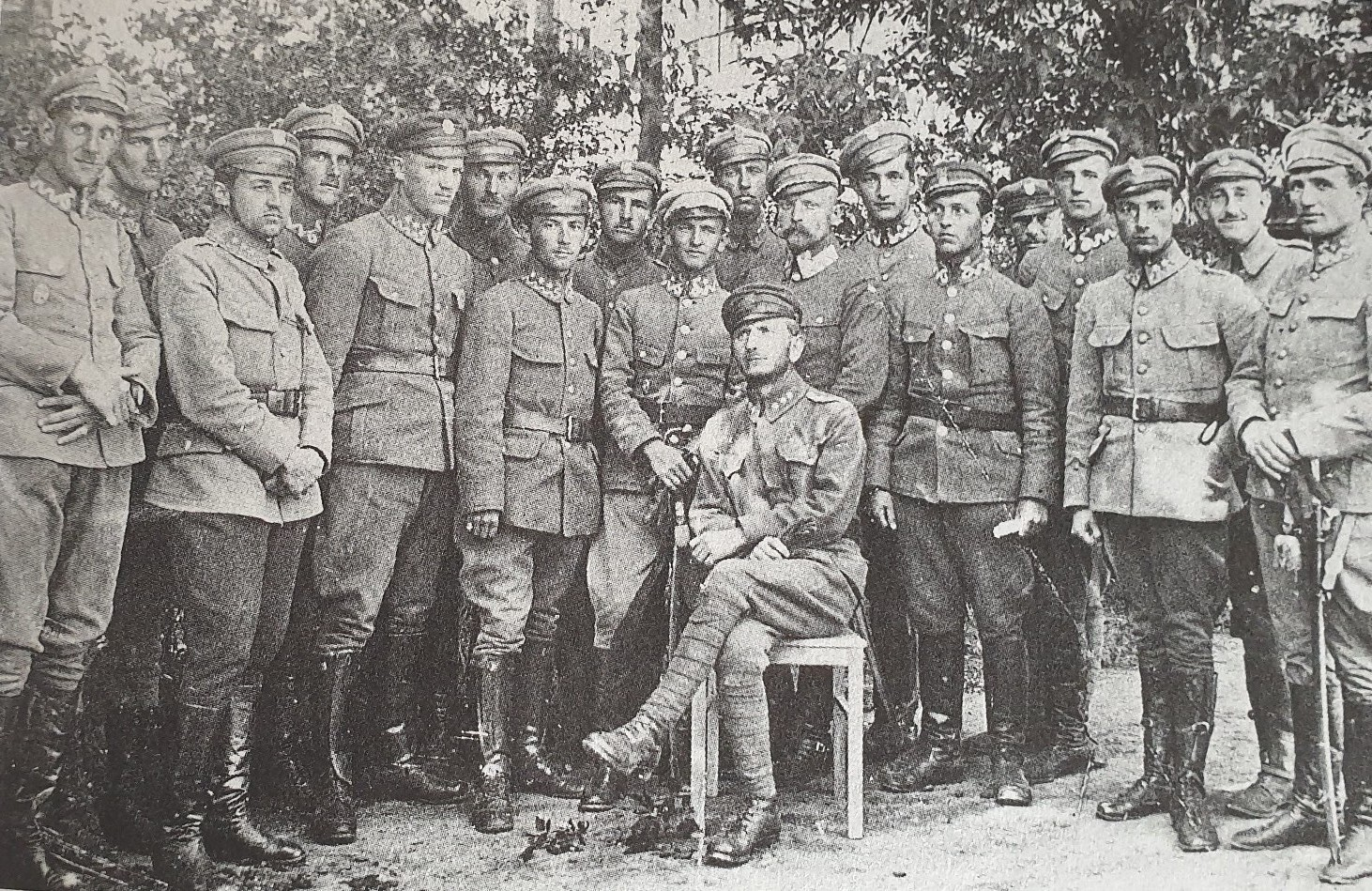 Ciechanów. Oficerowie 11 p.uł.